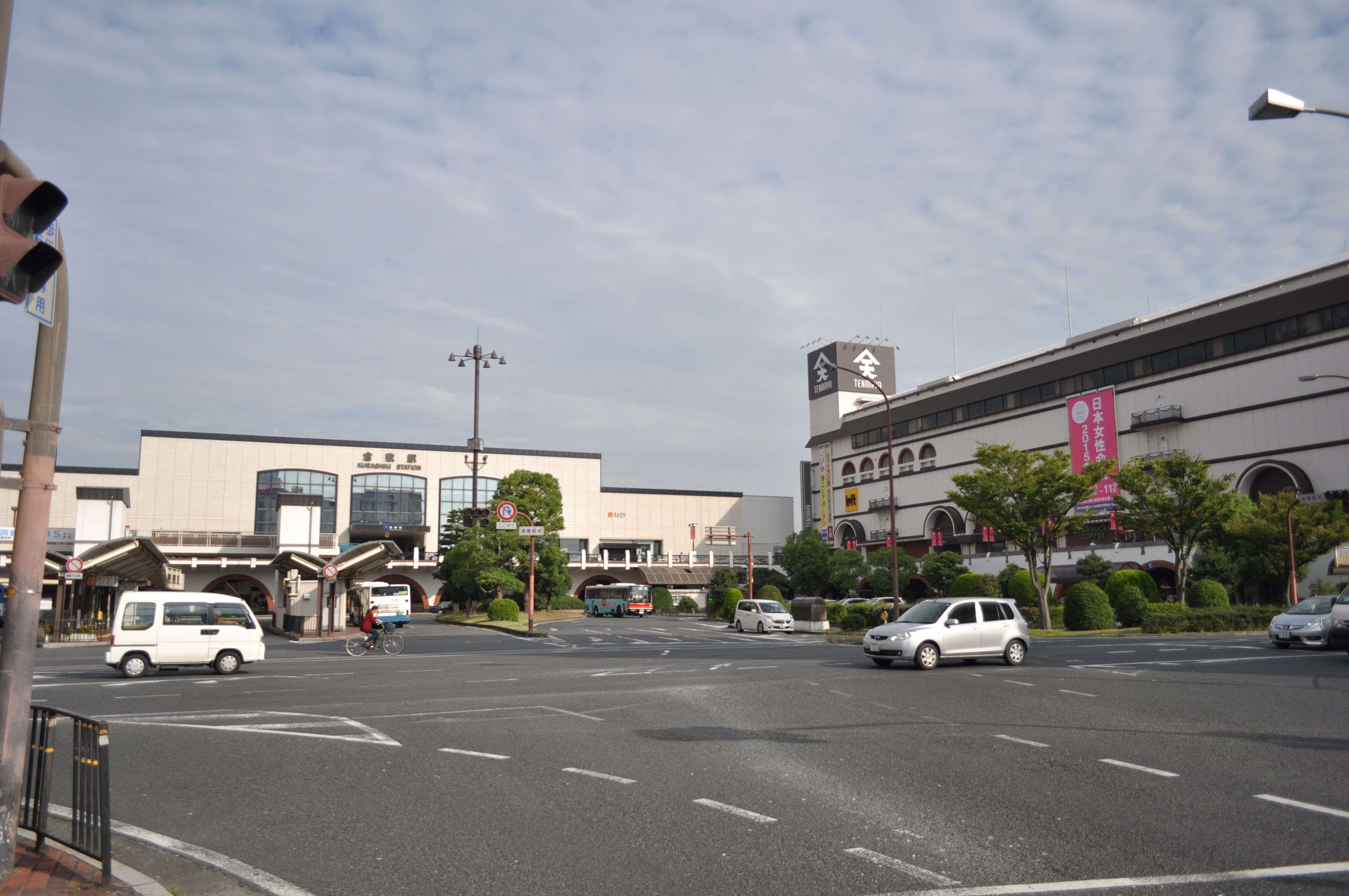 倉敷駅南口